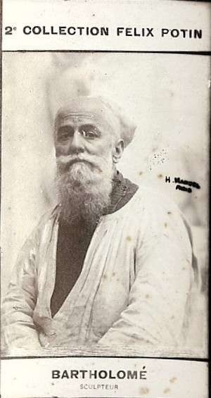 Bartholomé